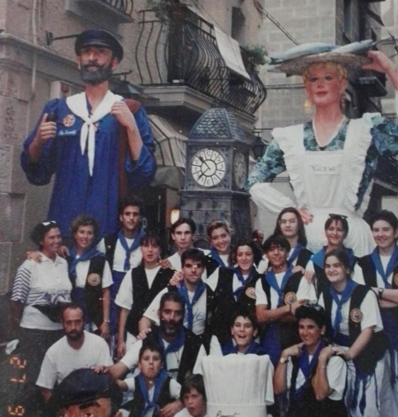 Fotografia estiu de l'any 1992: Membres de la primera colla gegantera dels Gegants de la Mar, els Gegants de la Barceloneta.